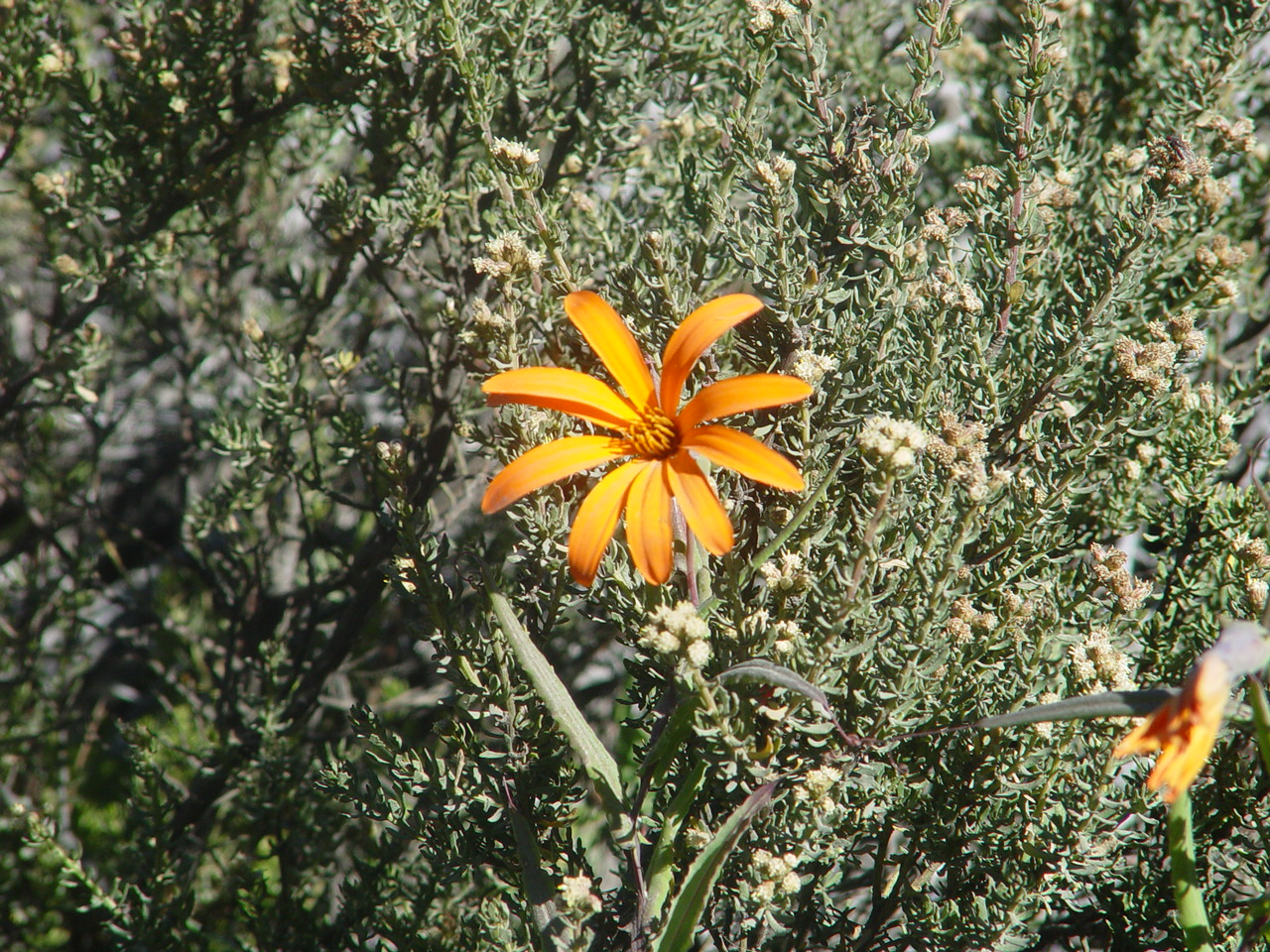 Imagen de la flor neuquina Mutisia, tomada en Moquehue, Neuquen, Argentina.